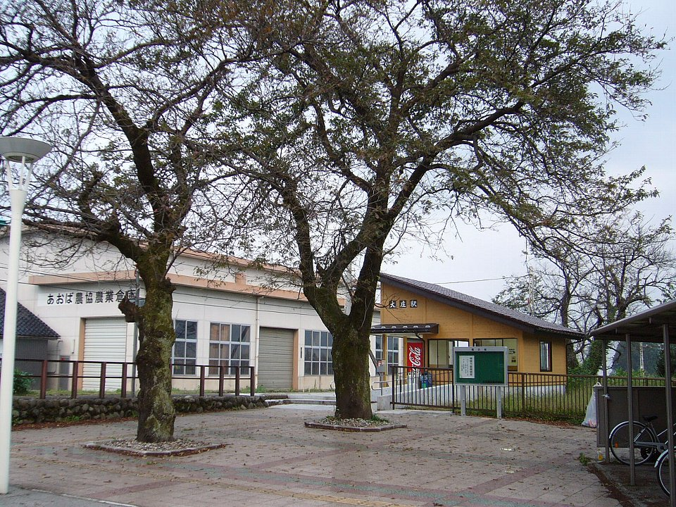 富山地方鉄道大庄駅 左手の農協倉庫との間にレールがある 手前に桜の木が2本植わる 2006年10月13日 Bakkai撮影